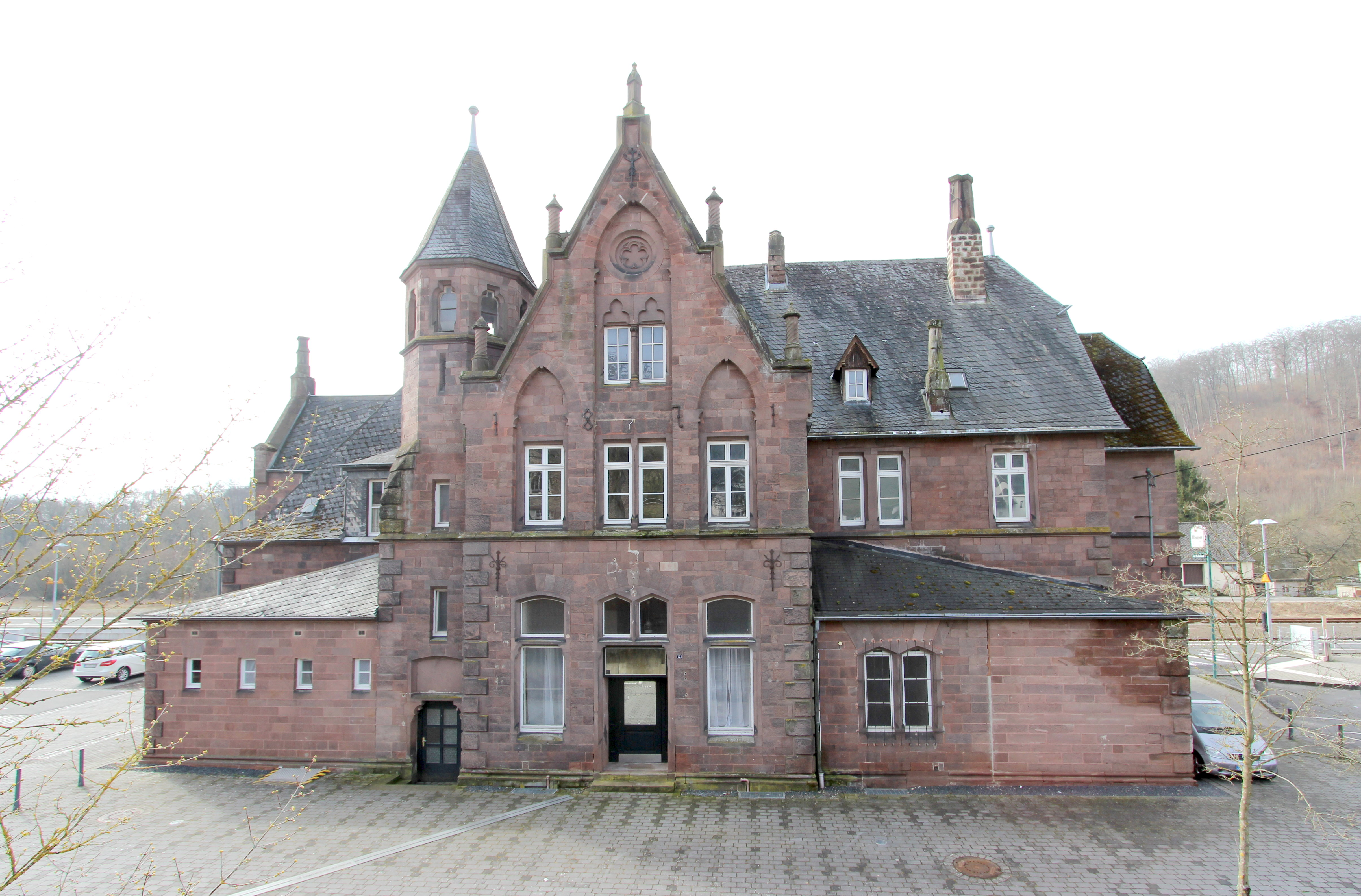 54634 Erdorf, Mainzer Straße 12. Bahnhof Erdorf der Eifelbahn; Empfangsgebäude, malerischer Rotsandsteinbau, teilweise Fachwerk, 1871. Aufnahme von 2018.